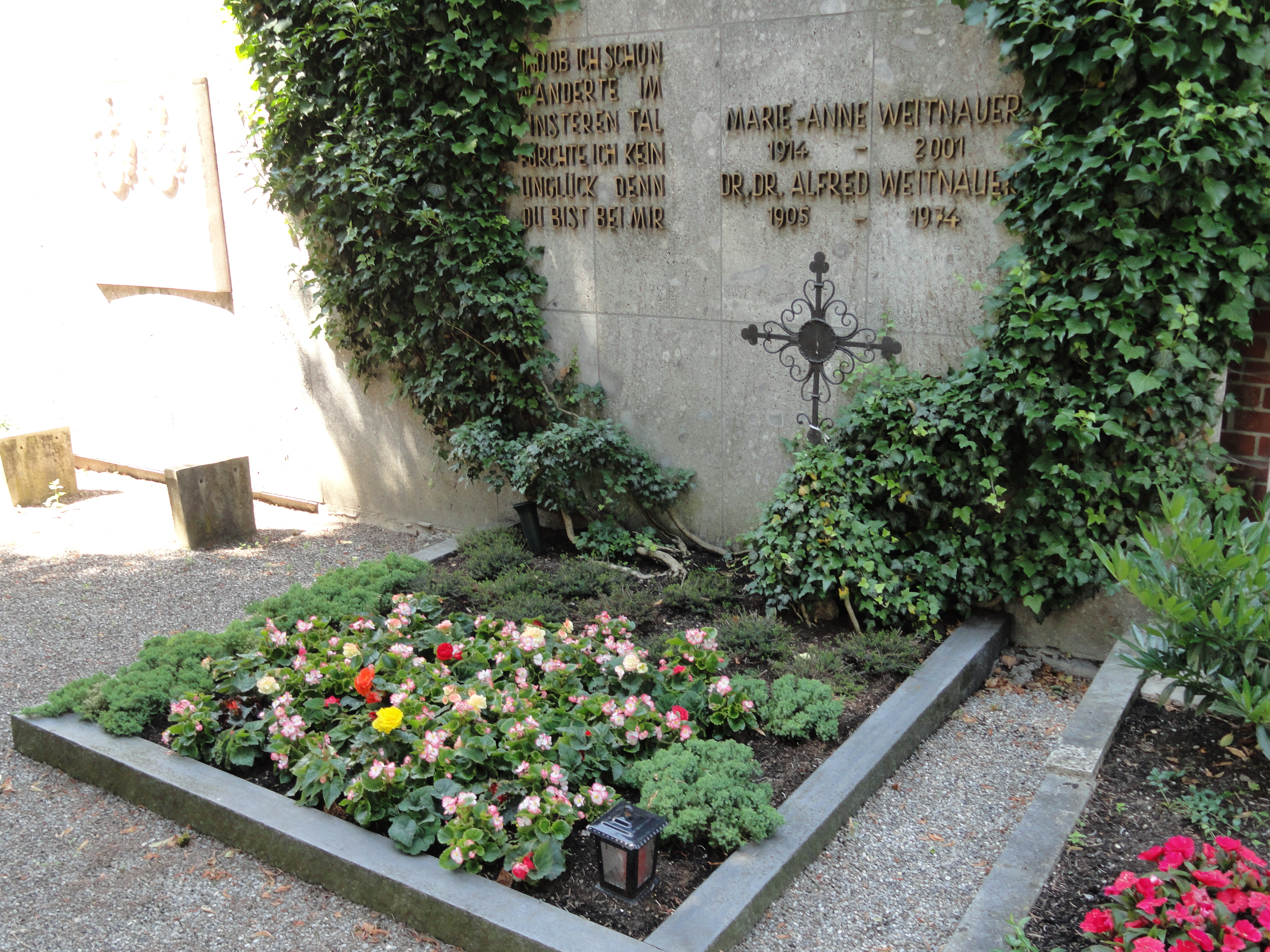 Evangelischer Friedhof Kempten - Friedhofskapelle, Ausgrabungen dahinter sowie Grabstellen einiger "Promis"